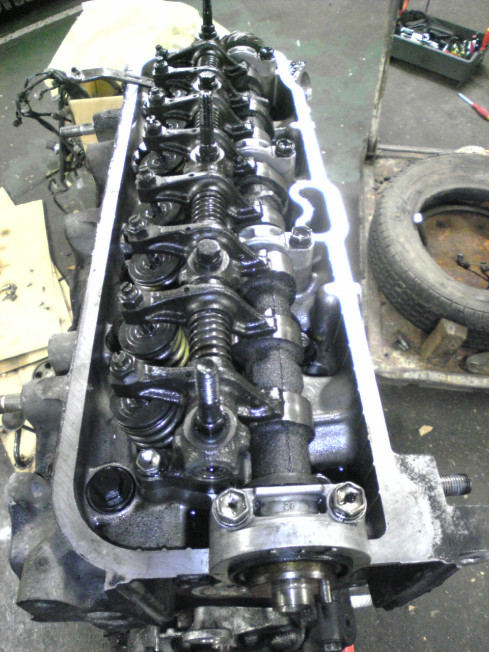 Toyota 3A-U engine